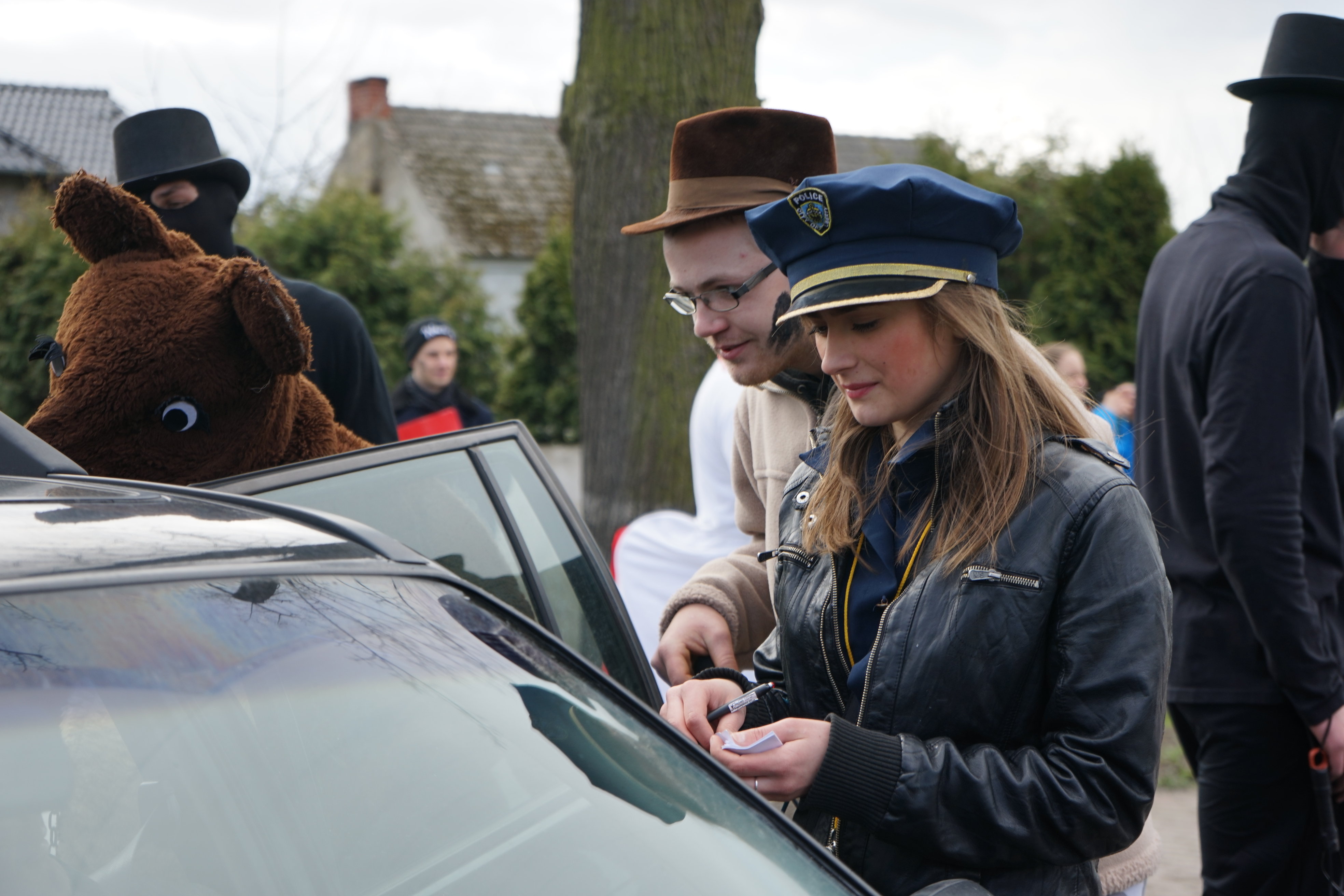 Siwki w Chobienicach odbywają się co roku w pierwszy dzień świąt Wielkanocnych. Grupy przebierańców zatrzymują samochody pobierając opłaty, grają i śpiewają na ulicach malując sadzą twarze mieszkańców, smagają rzemieniami łydki przechodniów. Zbierają dary i rozmawiają z chętnymi do udziału mieszkańcami. Pochód trwa od godzin południowych do późnego popołudnia.